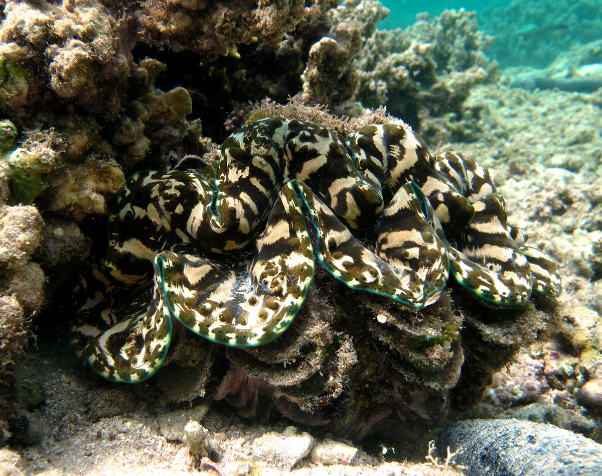 Le bénitier Tridacna elongatissima à la Réunion.